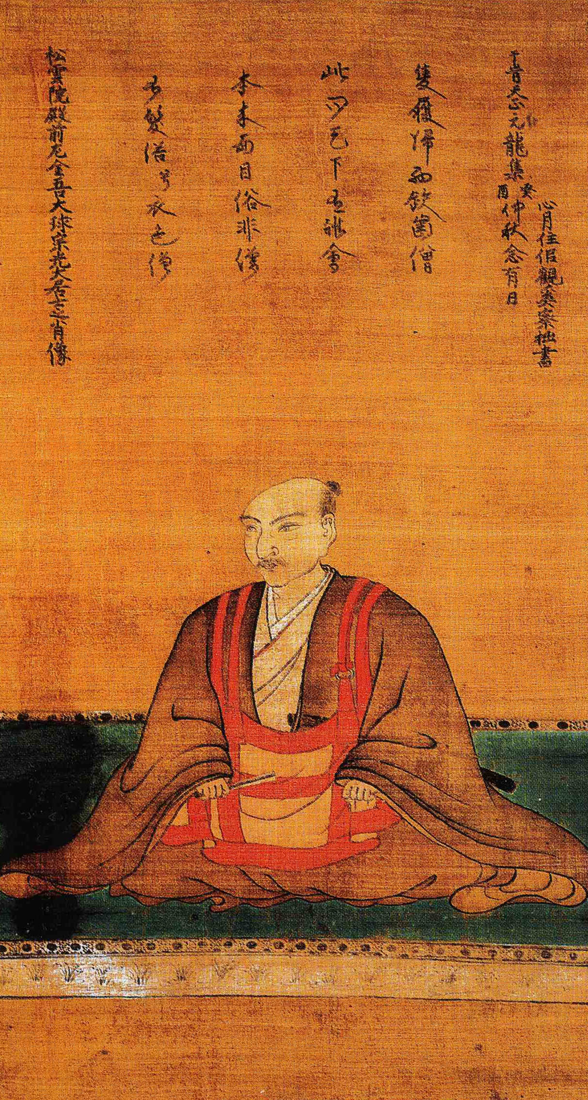 朝倉義景画像＜複製＞